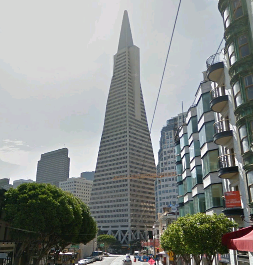 צילום פירמידת טראנסאמריקה באחד הרחובות באזור